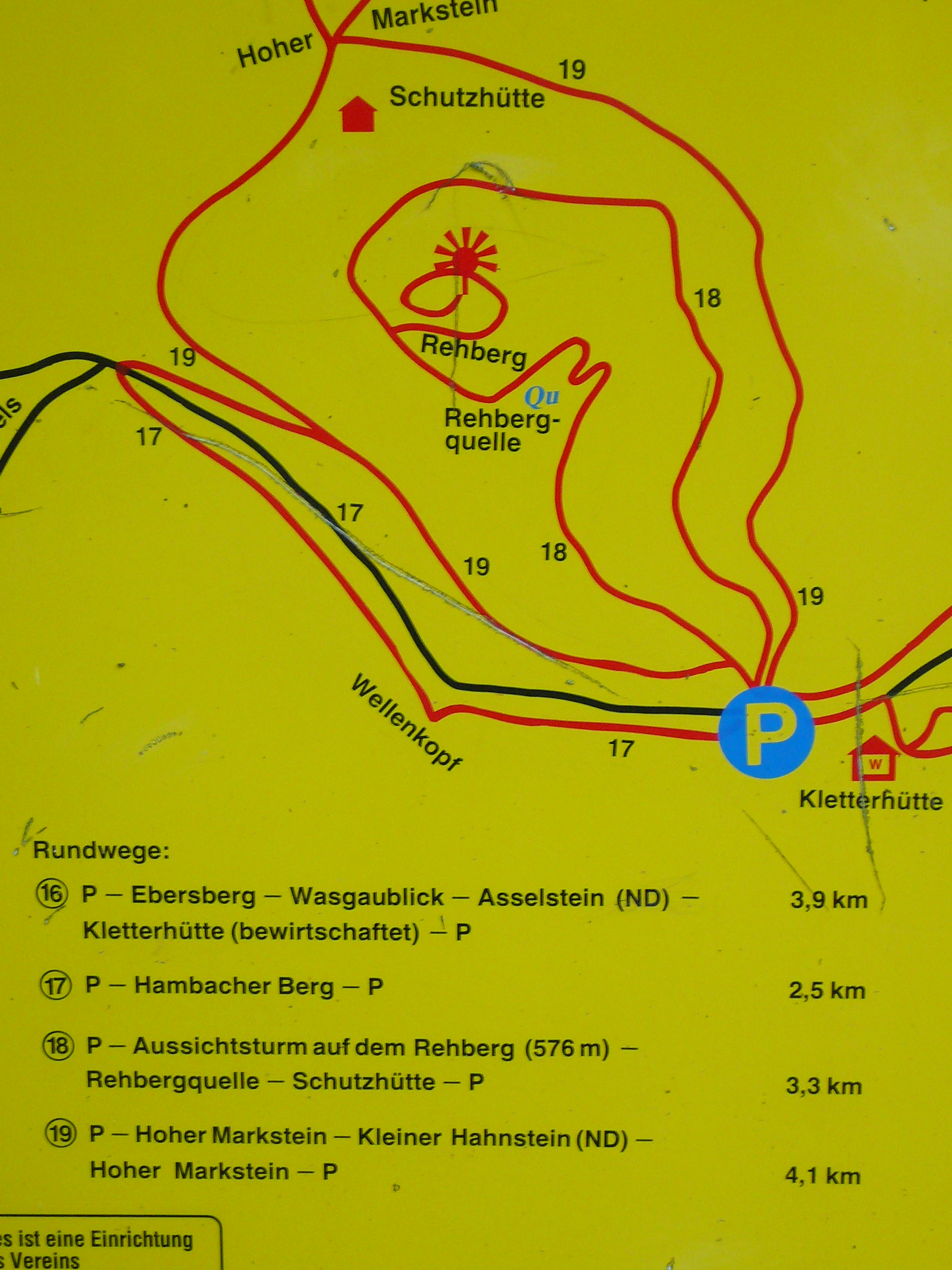 Rundwanderungen vom Rehbergparkplatz